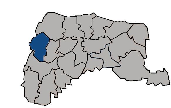 台灣省雲林縣台西鄉 KaurJmeb於2005年1月28日為編輯zh:台西鄉所繪製